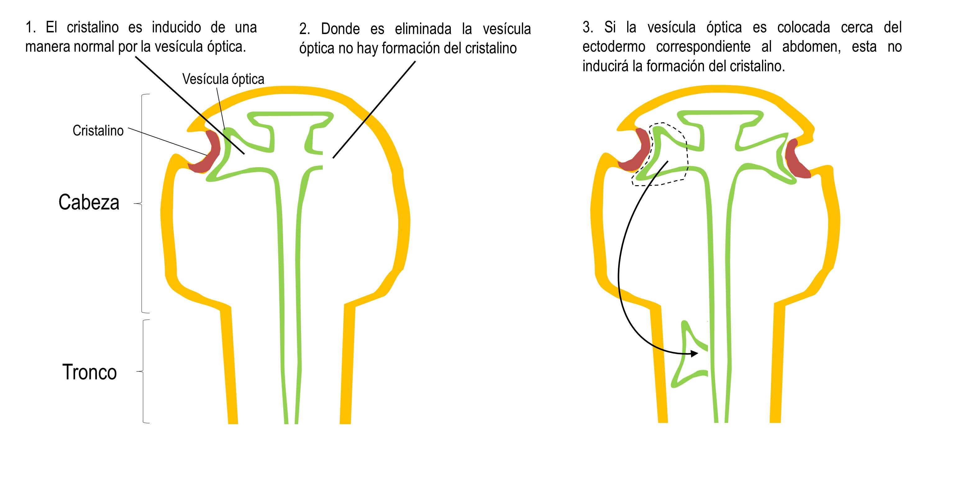 Imagen que ilustra el concepto de inducción y competencia en la interacción entre la vesícula óptica y el ectodermo cefálico.